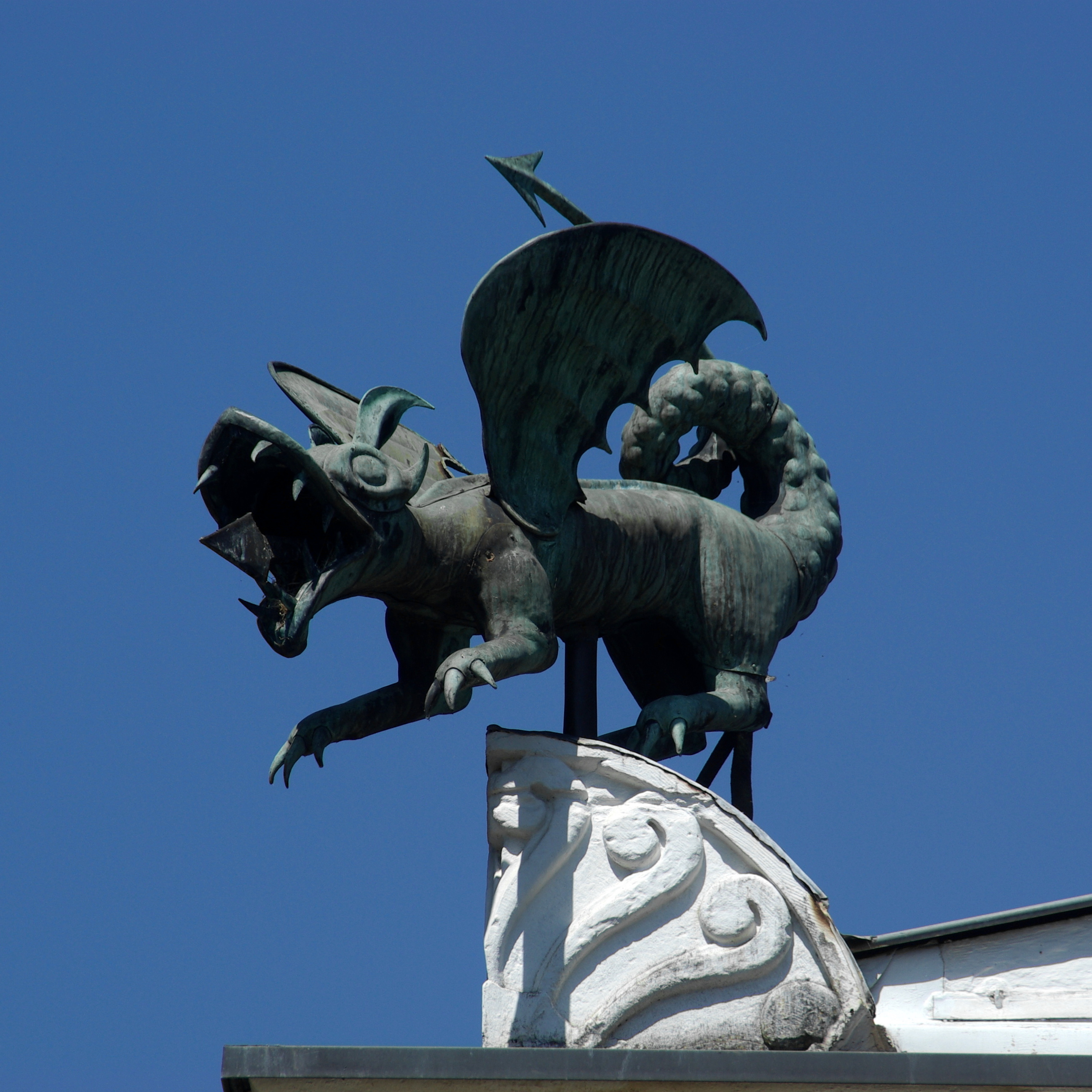 Trier, Drachenhaus